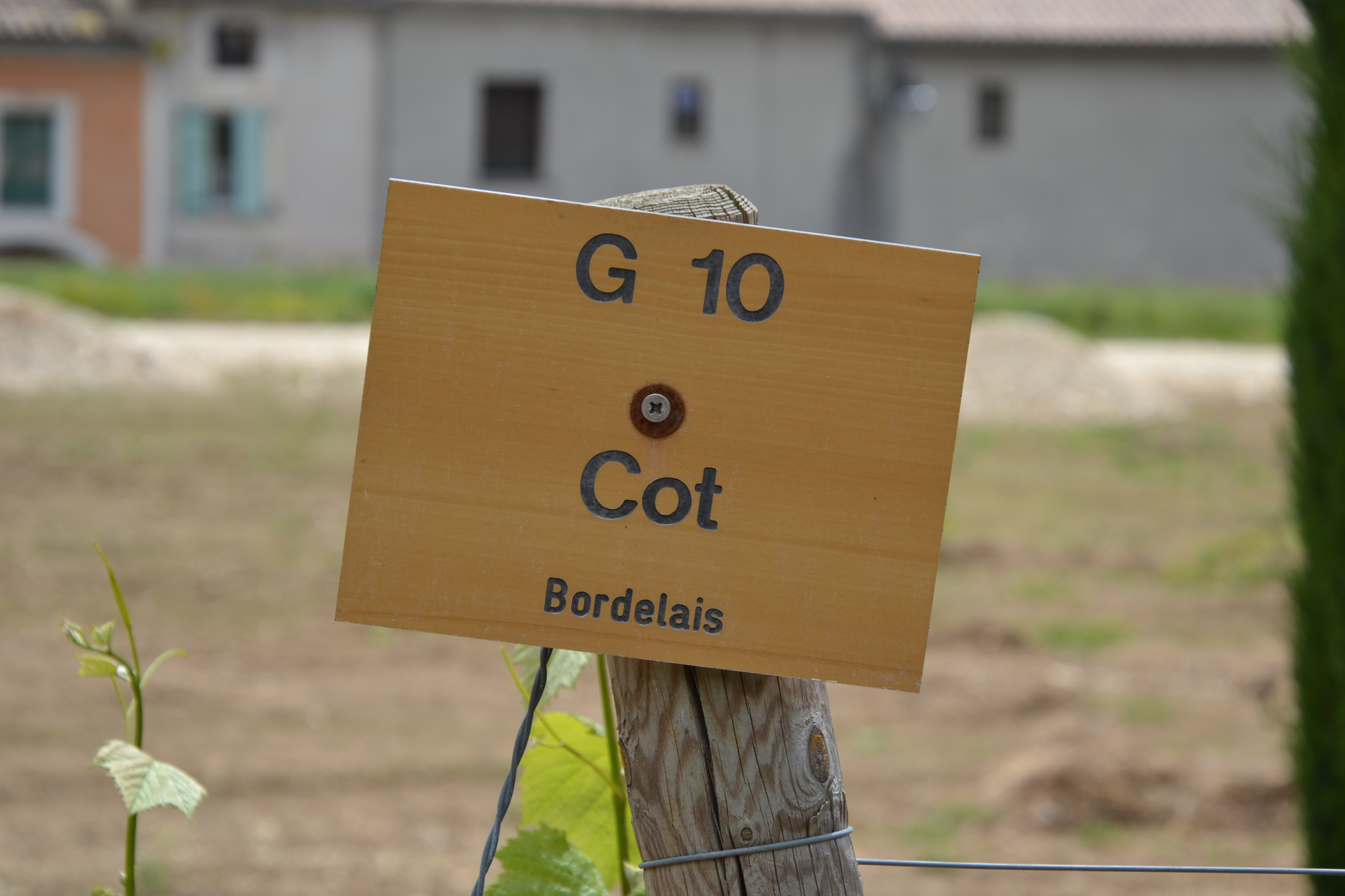 panneau de cépage cot, aussi appelé Malbec